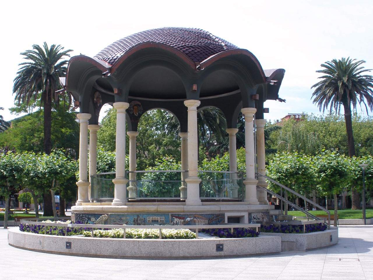 Parque de Santurtzi (Santurtzi, Bizkaia)